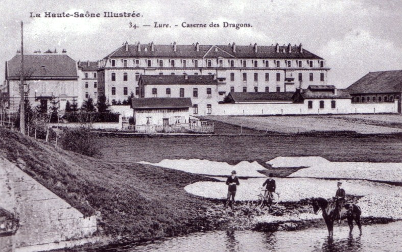 Il s'agit d'une carte postale très ancienne montrant la caserne du 1er Régiment de Dragon.